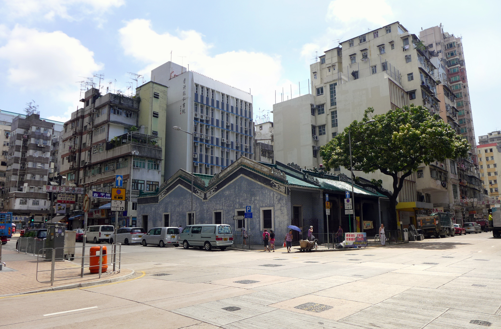 Yee Kuk Street